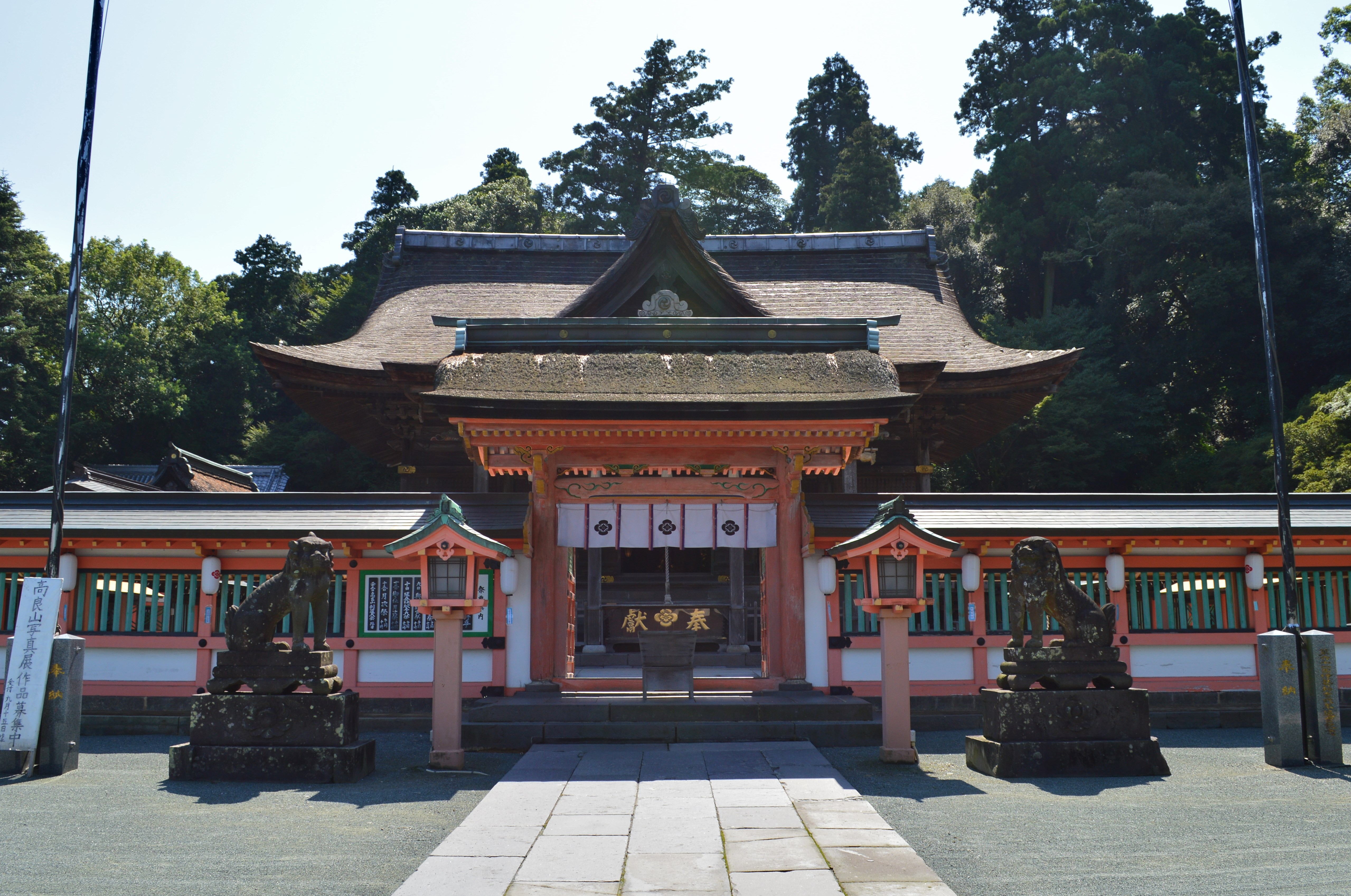 高良大社 中門